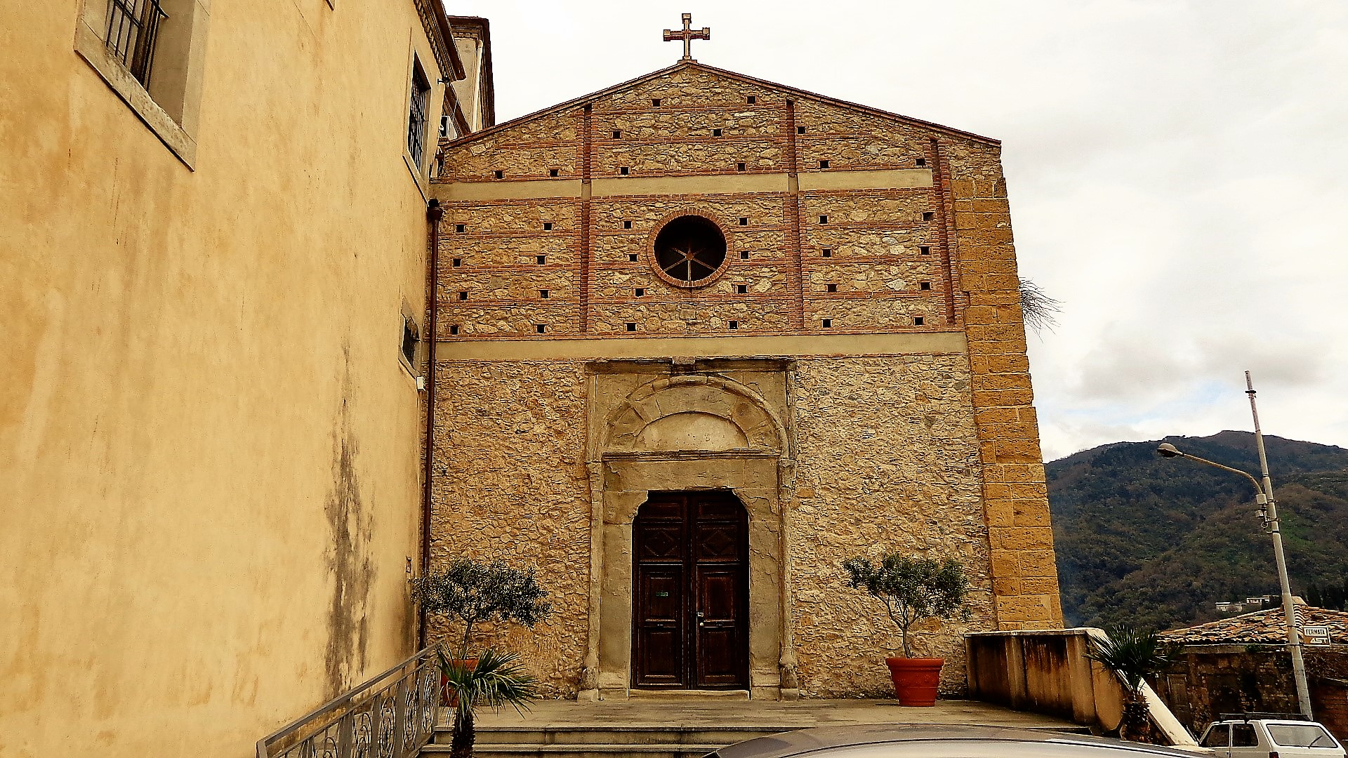 Facciata